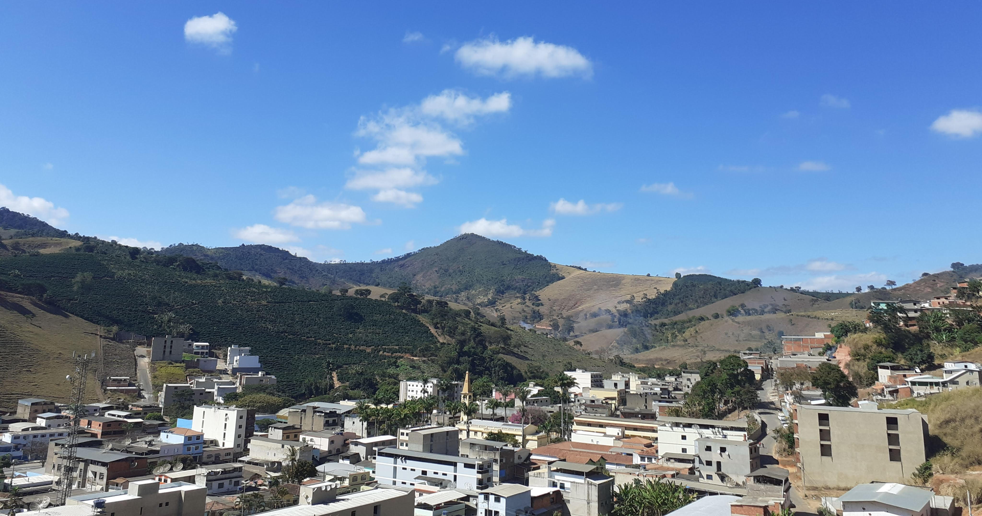 Vista da região central de Santa Rita de Minas fotografada por Josias Pereira Soares